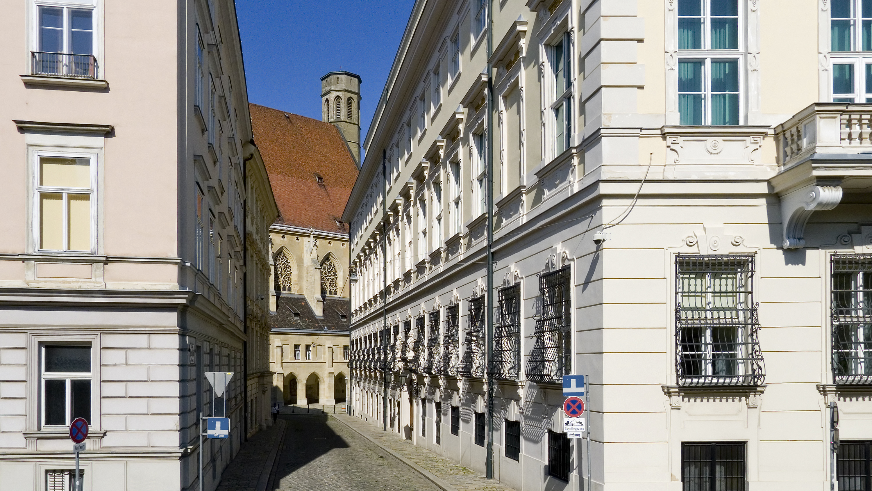 Metastasiogasse in Wien 1 bei der Löwelstraße Richtung Osten